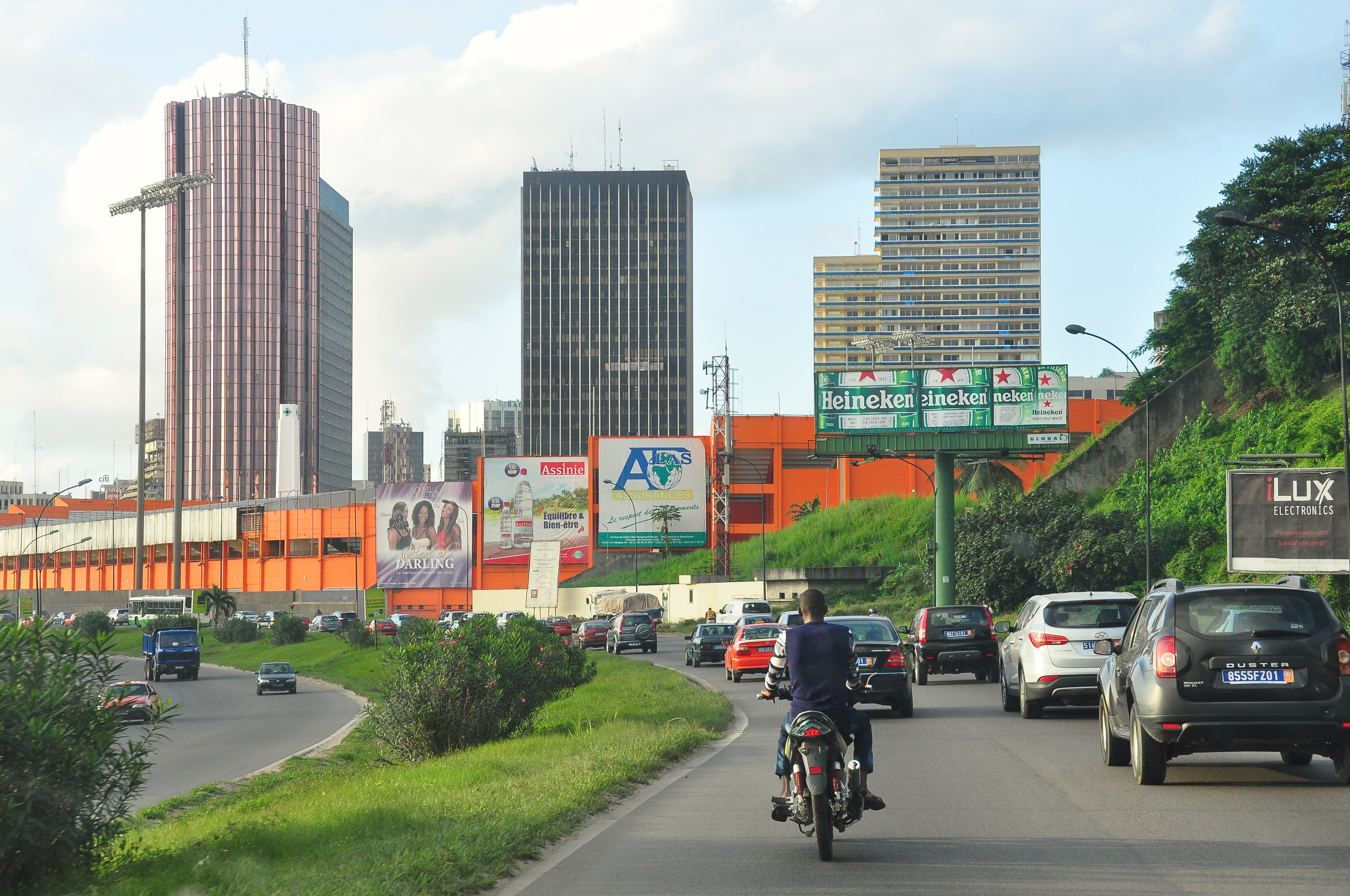 Abidjan's plateau district view by the Boulevard de Gaulle